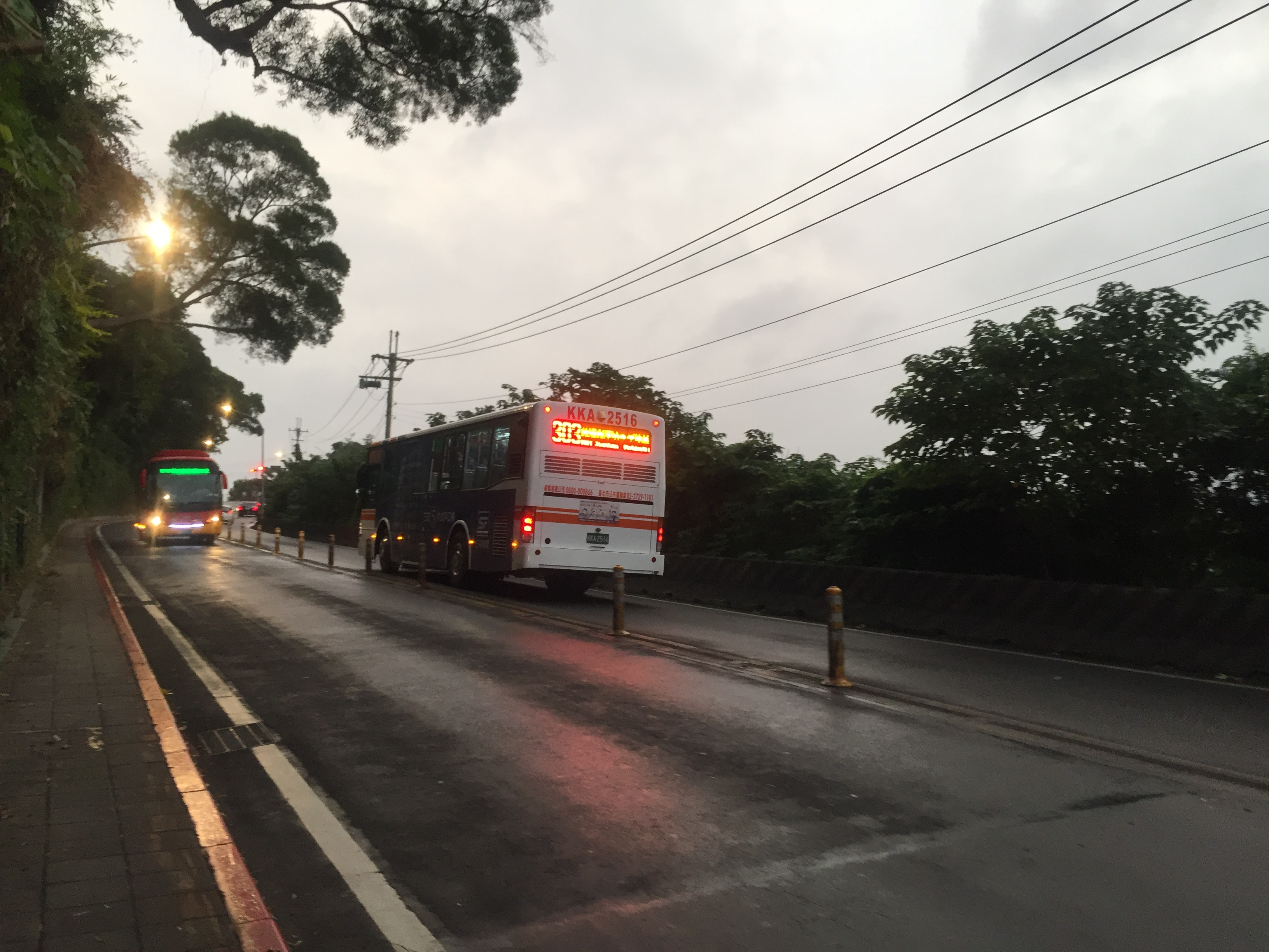 仰德大道一段下雨天路景（一旁為公車1717,303駛於路上）下午六點時